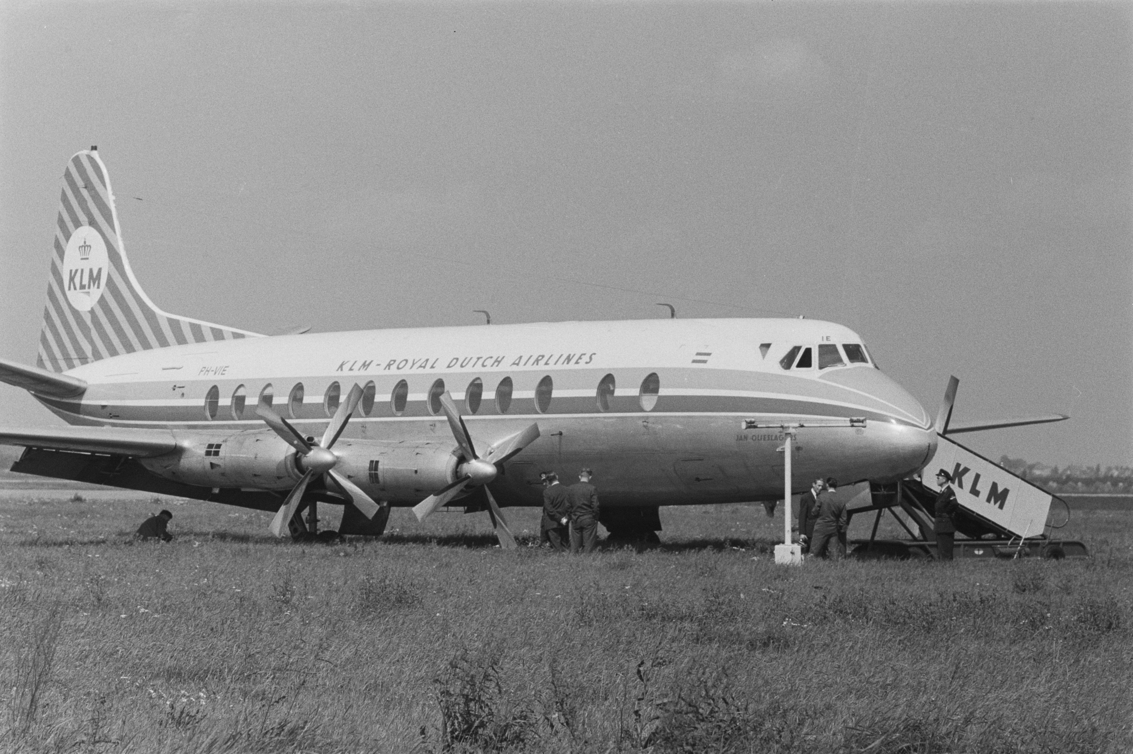 Collectie / Archief : Fotocollectie Anefo Reportage / Serie : [ onbekend ] Beschrijving : Viscount "Jan Olieslagers" loopt tijdens landing van landingsbaan af Datum : 17 augustus 1960 Trefwoorden : LANDINGEN Fotograaf : Pot, Harry / Anefo Auteursrechthebbende : Nationaal Archief Materiaalsoort : Negatief (zwart/wit) Nummer archiefinventaris : bekijk toegang 2.24.01.05 Bestanddeelnummer : 911-5043